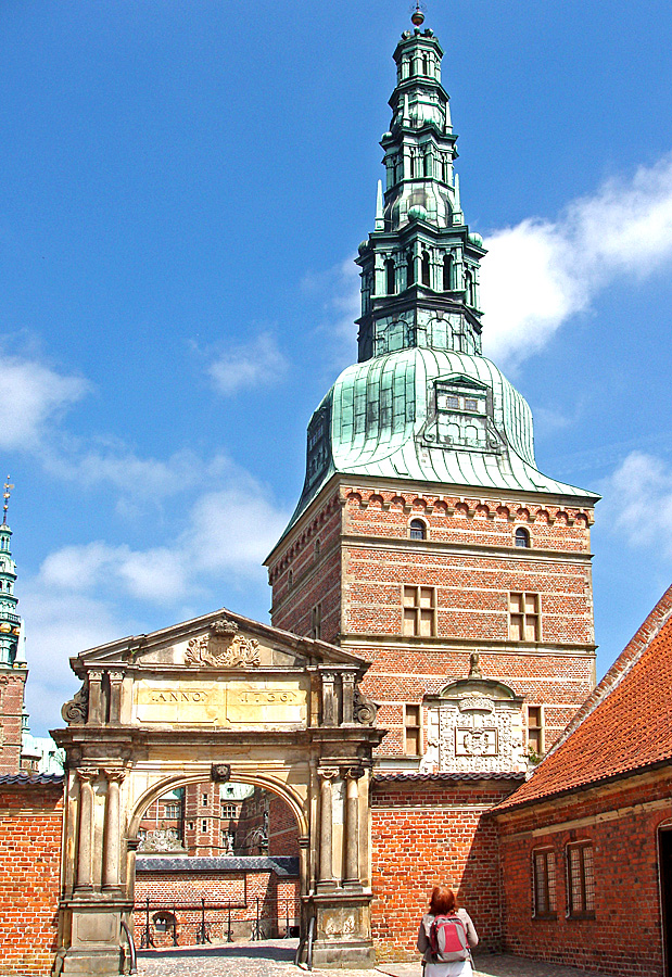 Chr.6's portal (1736) og fangetårnet (1620) på Frederiksborg Slot, Hillerød, Denmark. photo by: Nico-dk/Nils Jepsen